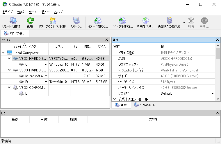 R-Studio: メインパネル